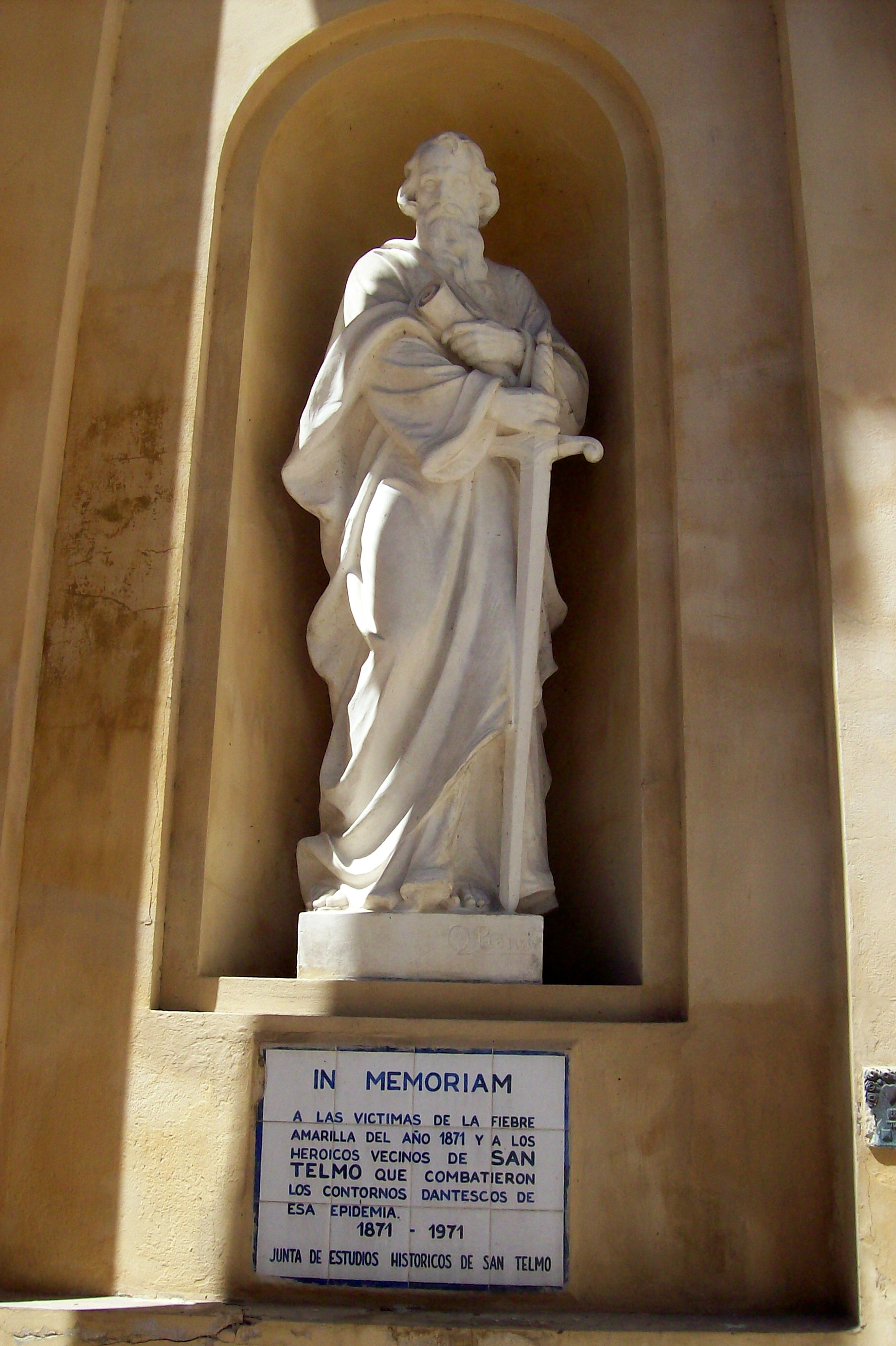 Placa de la Junta de estudios históricos de San Telmo recordando a las víctimas de Fiebre Amarilla en Buenos Aires en 1871.